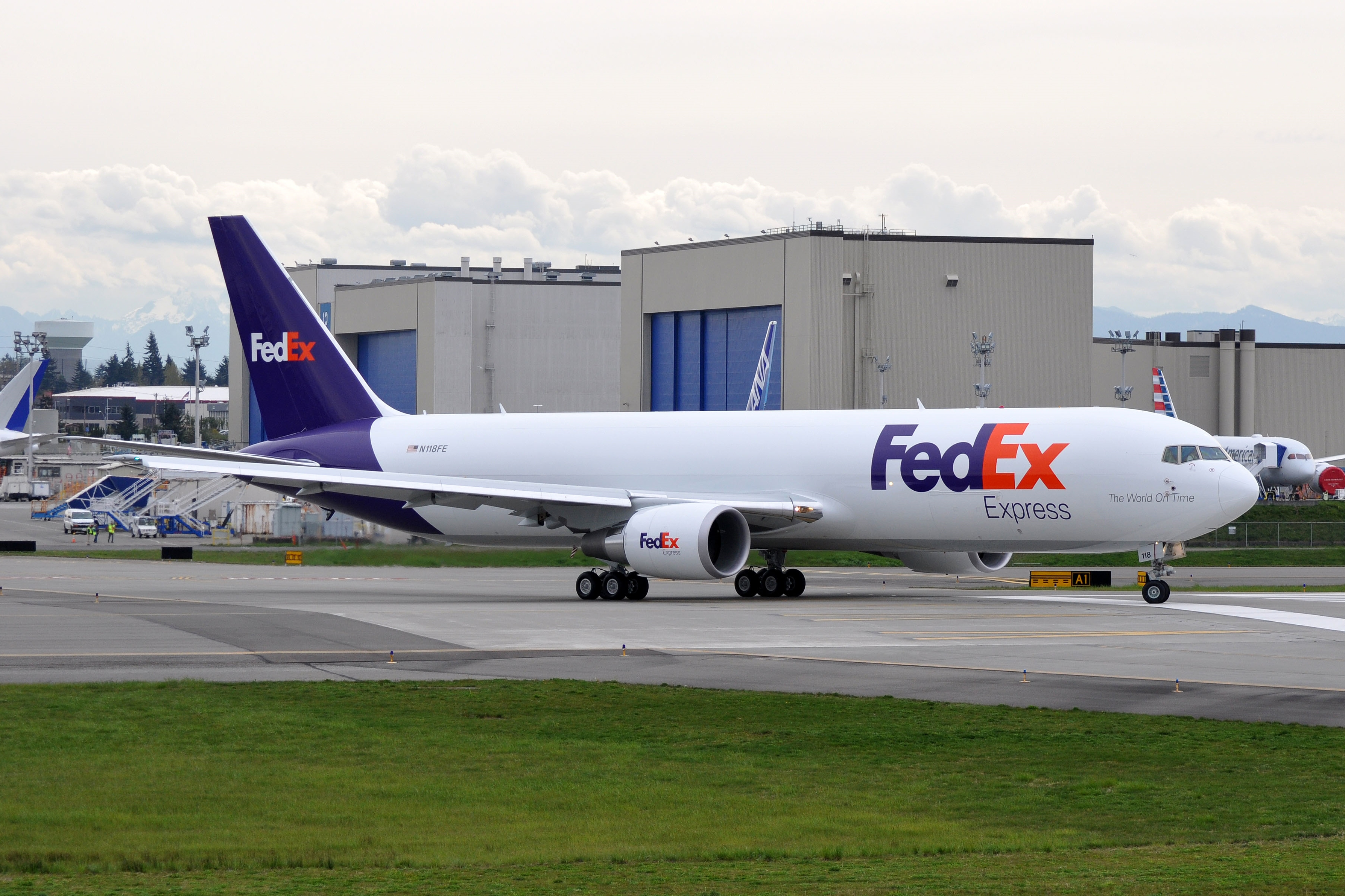 MSN 42714 LN 1080 B767-3S2ERF FEDEX FEDERAL EXPRESS PAE BOEING AIRPORT